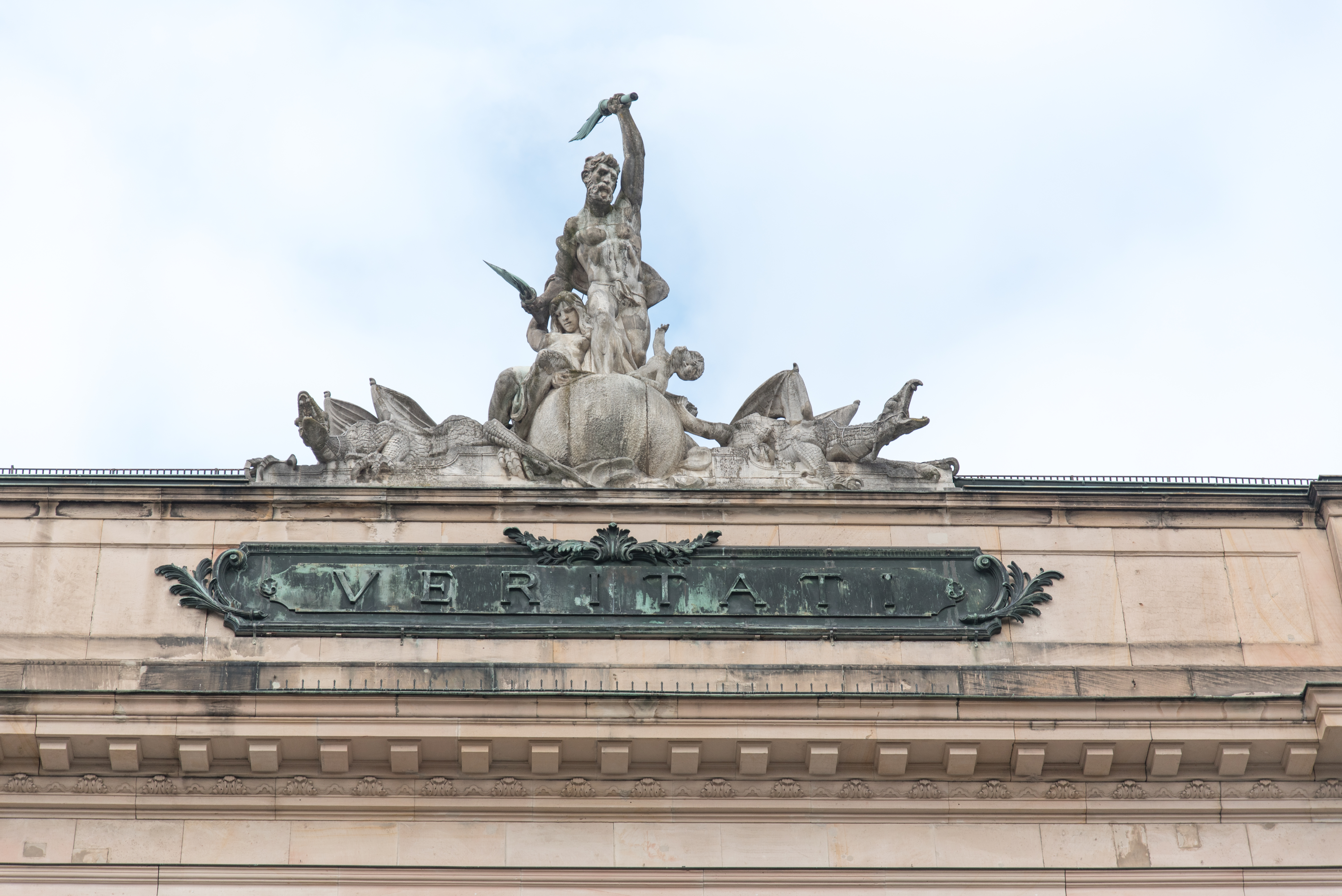 Würzburg, Sanderring 2